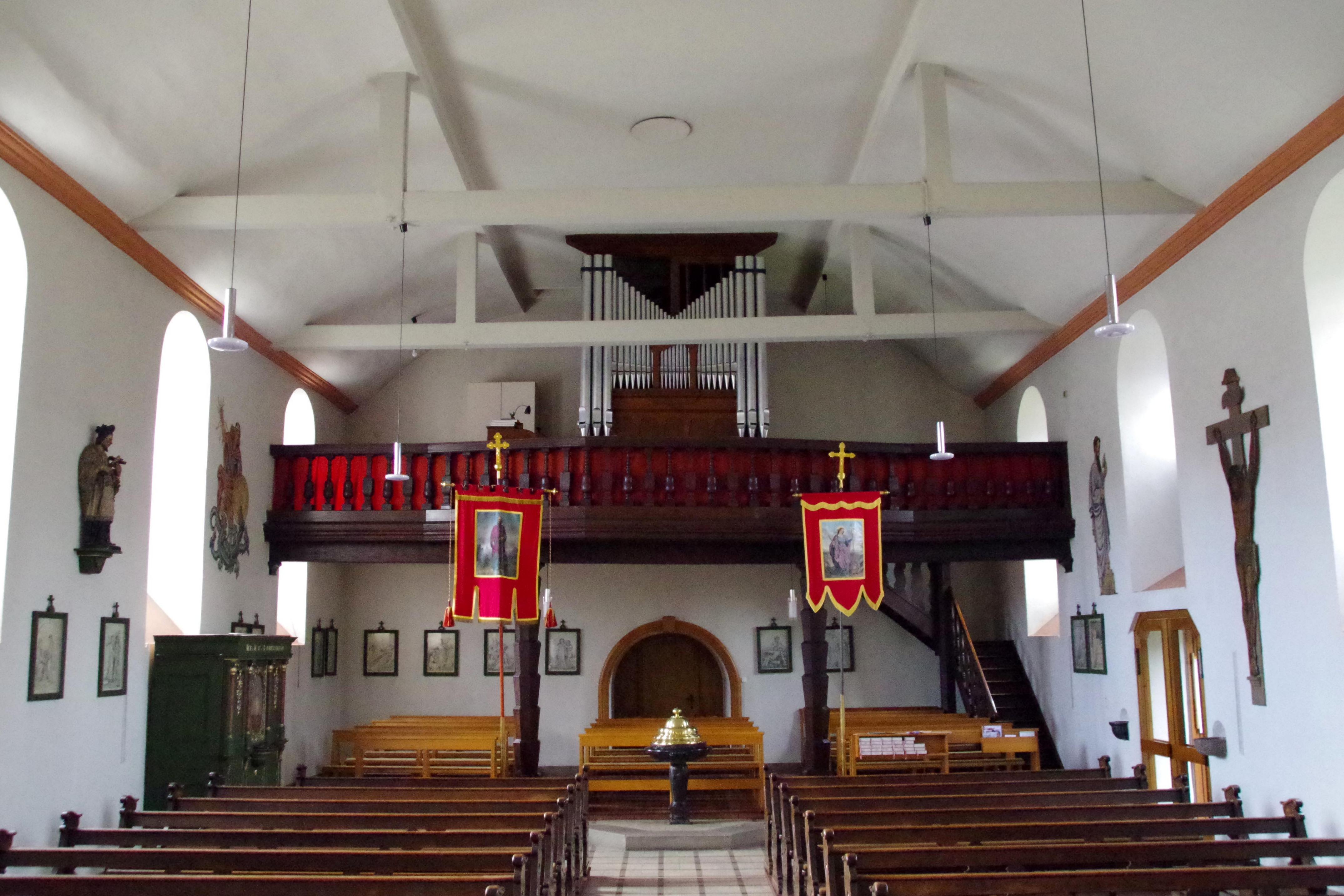 St. Margareta (Frohngau), Blick durchs Kirchenschiff zur Orgelempore